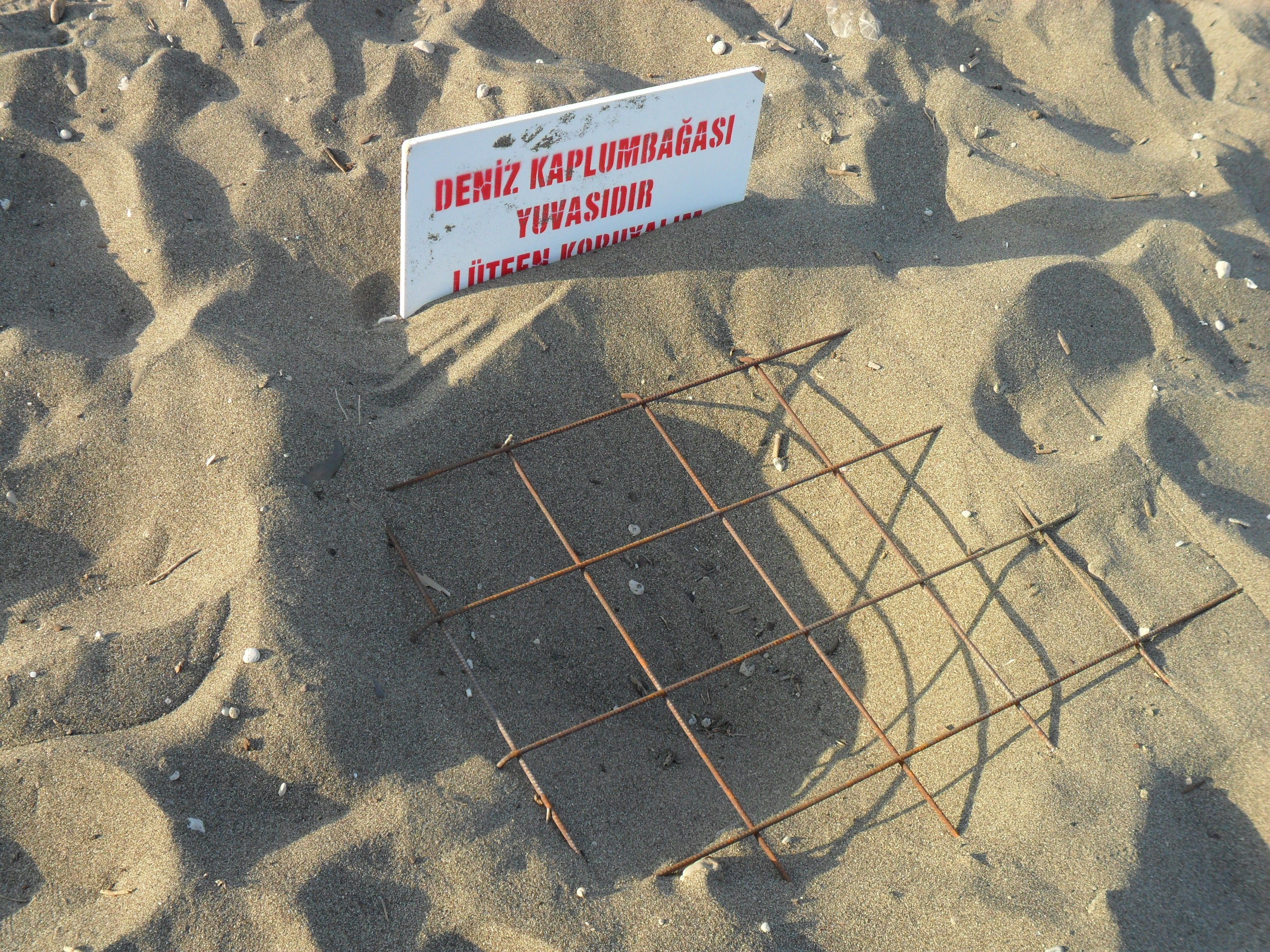 Davultepe Sahili'nde yer alan deniz kaplumbağası yuvası.